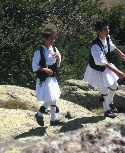 derivative of